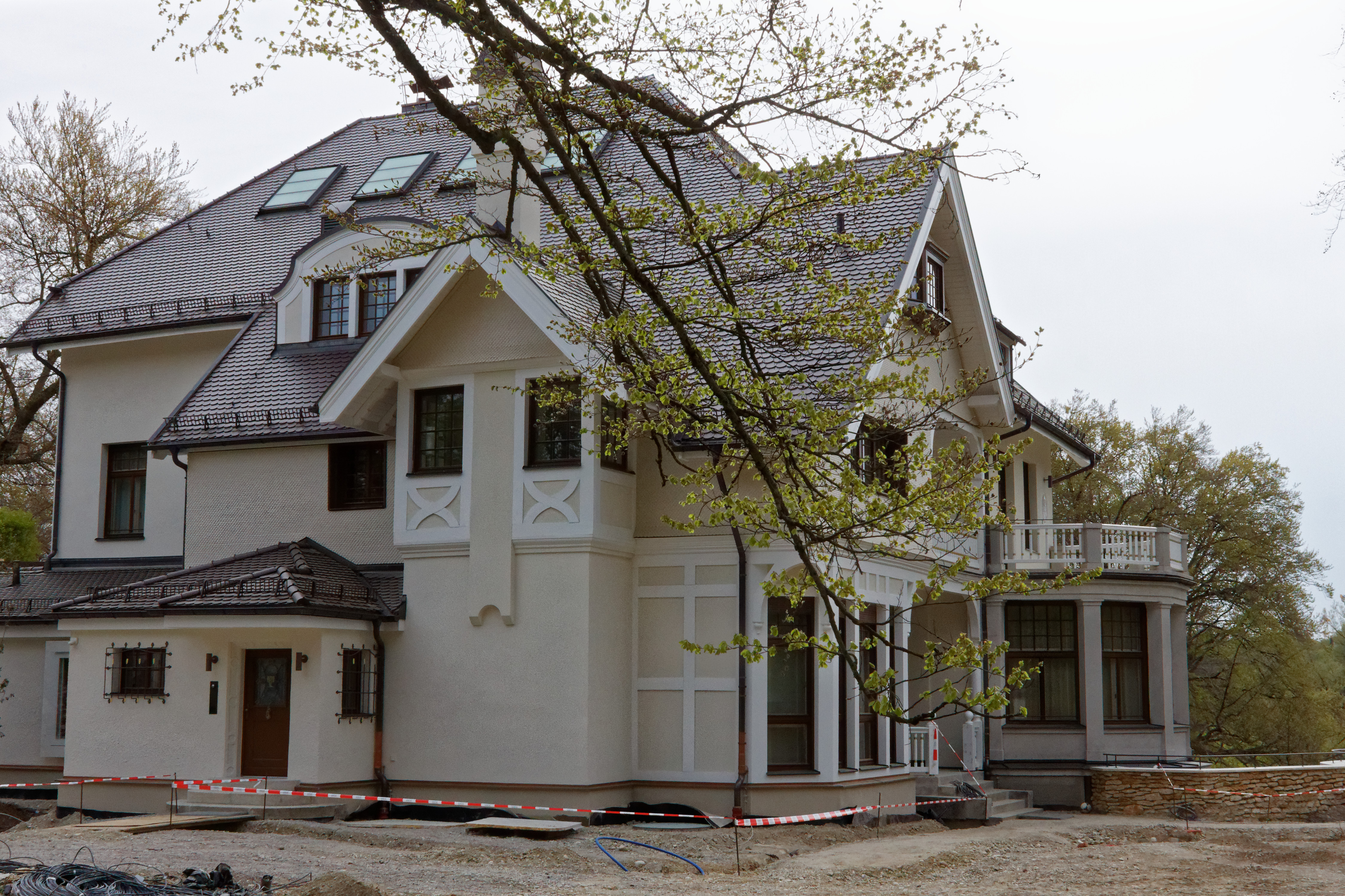 Villa Littmann in der Heilmannstraße 29 in München